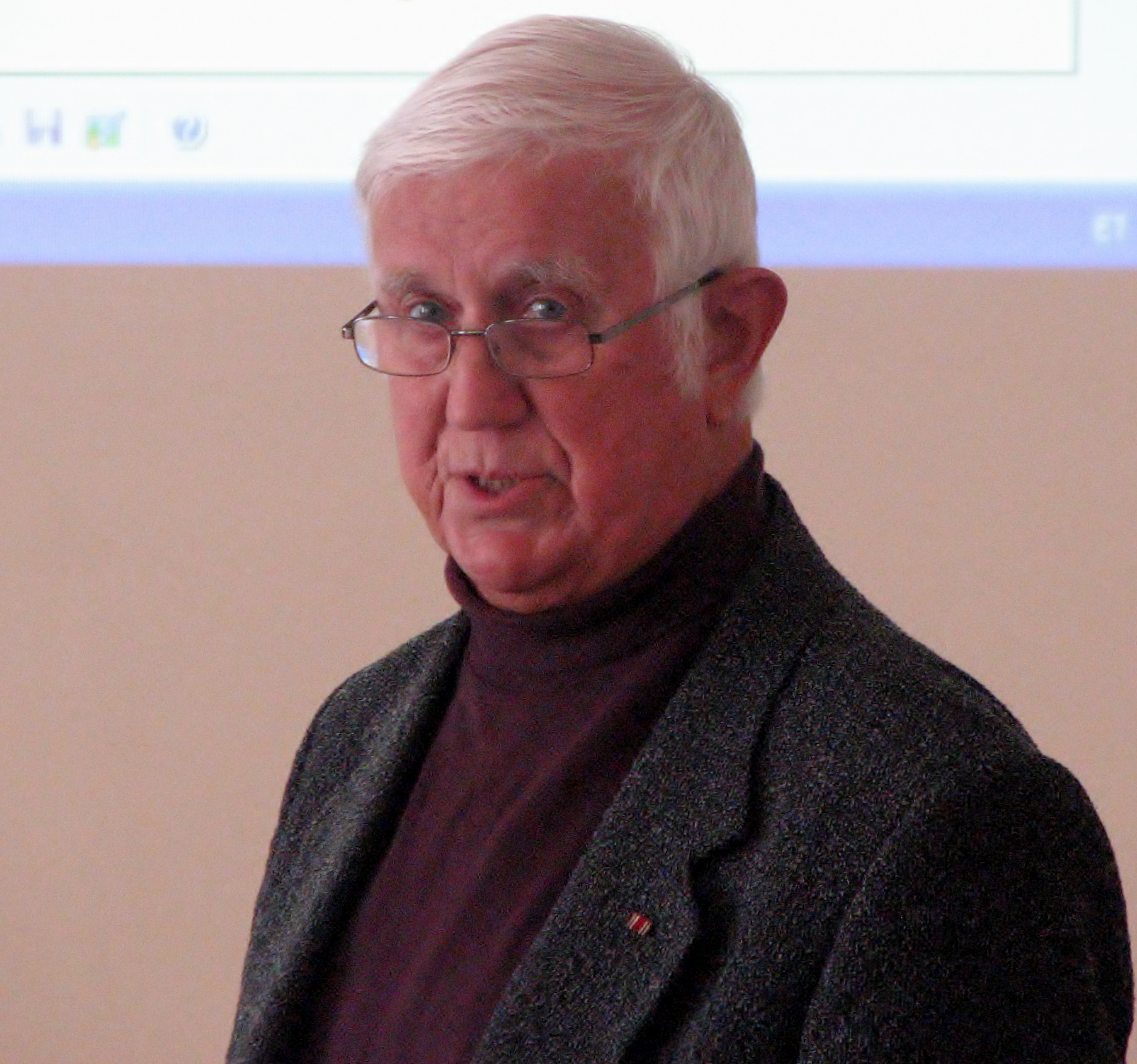 Sulev Mäeväli rääkimas Raekoja plats 14 ja Vene tänav 5 hoone ajaloost Tallinna Õpetajate Maja 55. sünnipäeva puhul